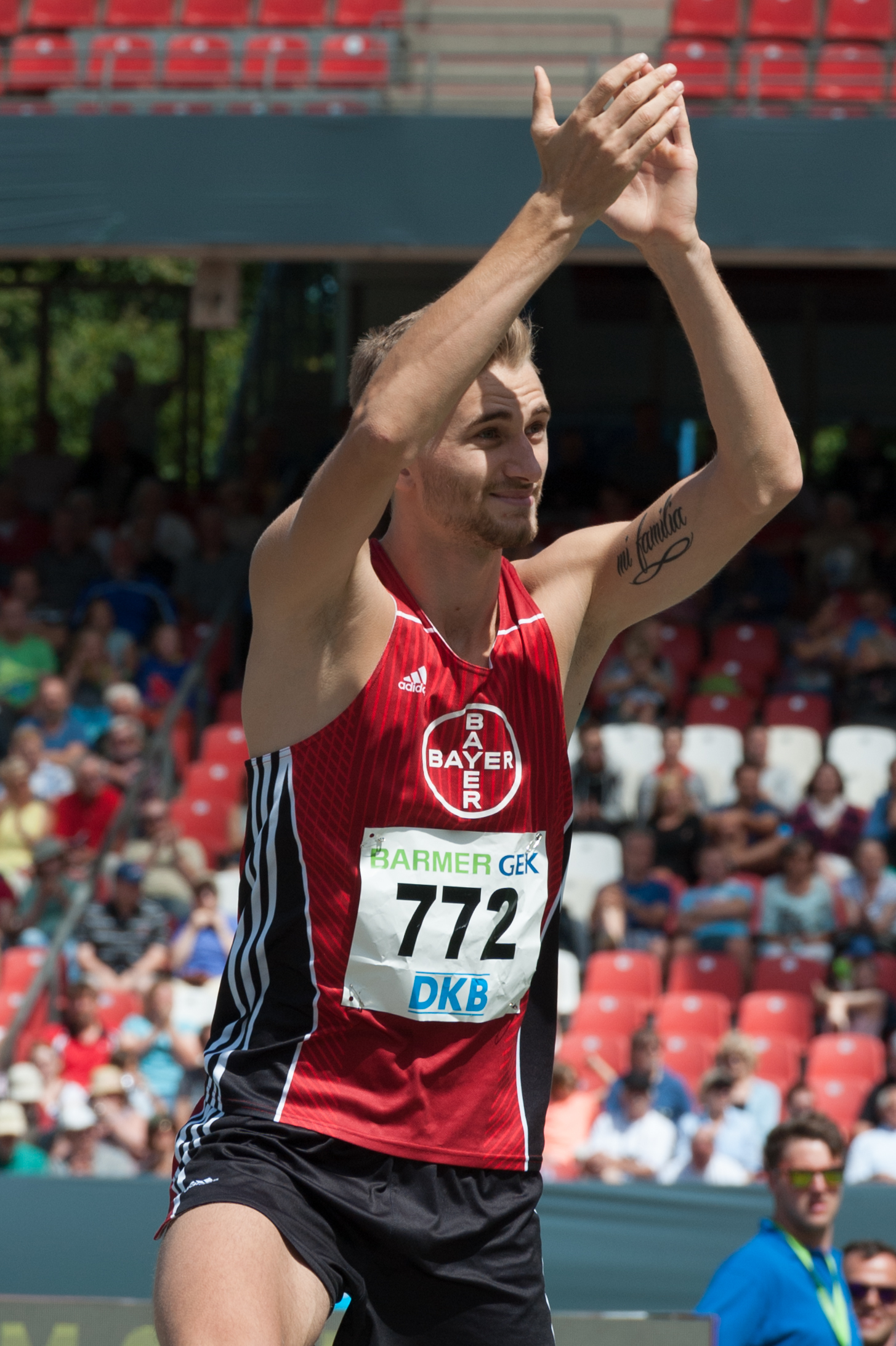 Deutsche Leichtathletik-Meisterschaften 2015: Männer Hochsprung - Mateusz Przybylko, TSV Bayer 04 Leverkusen